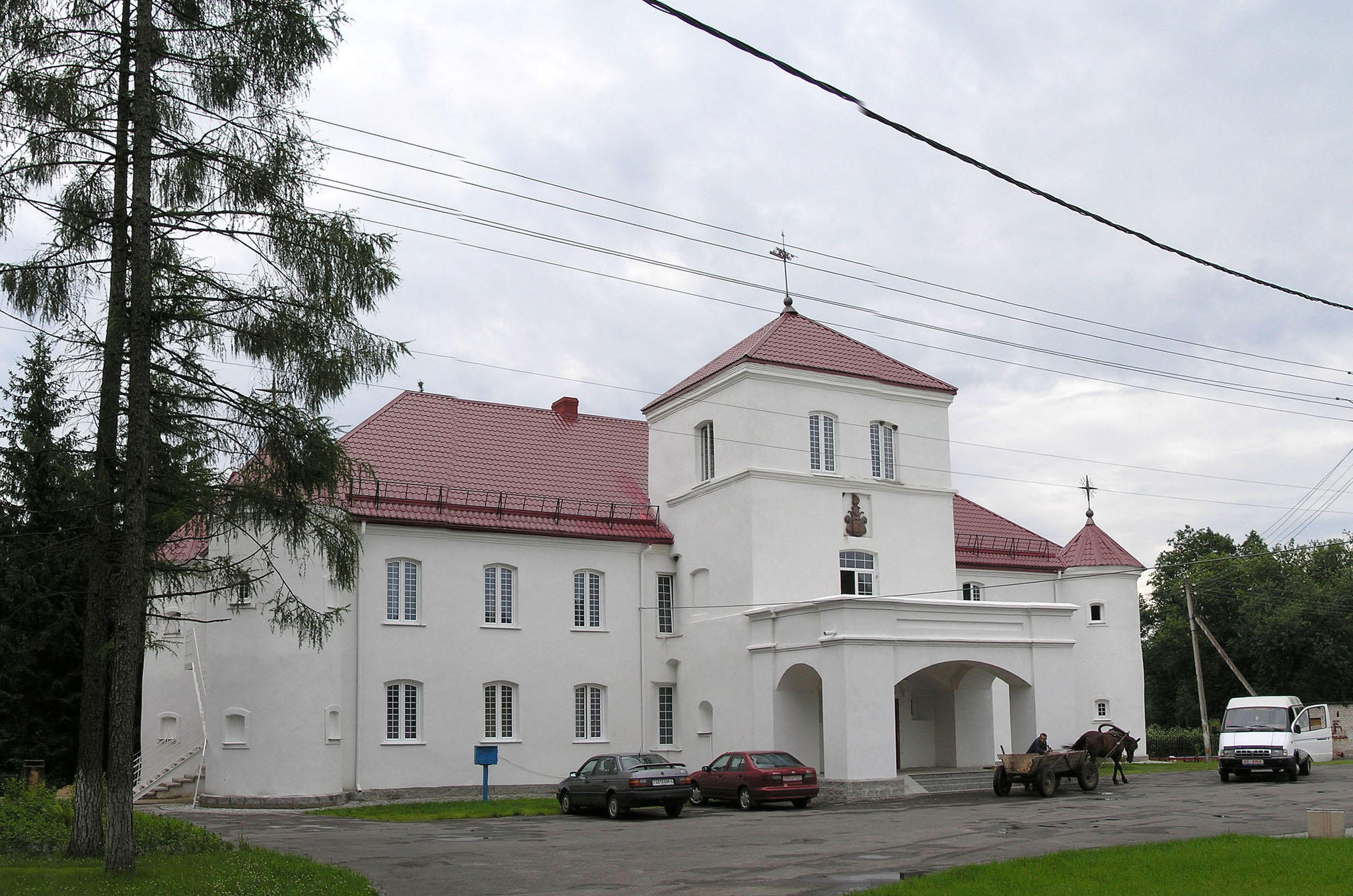 Гайтюнишский дом-замок